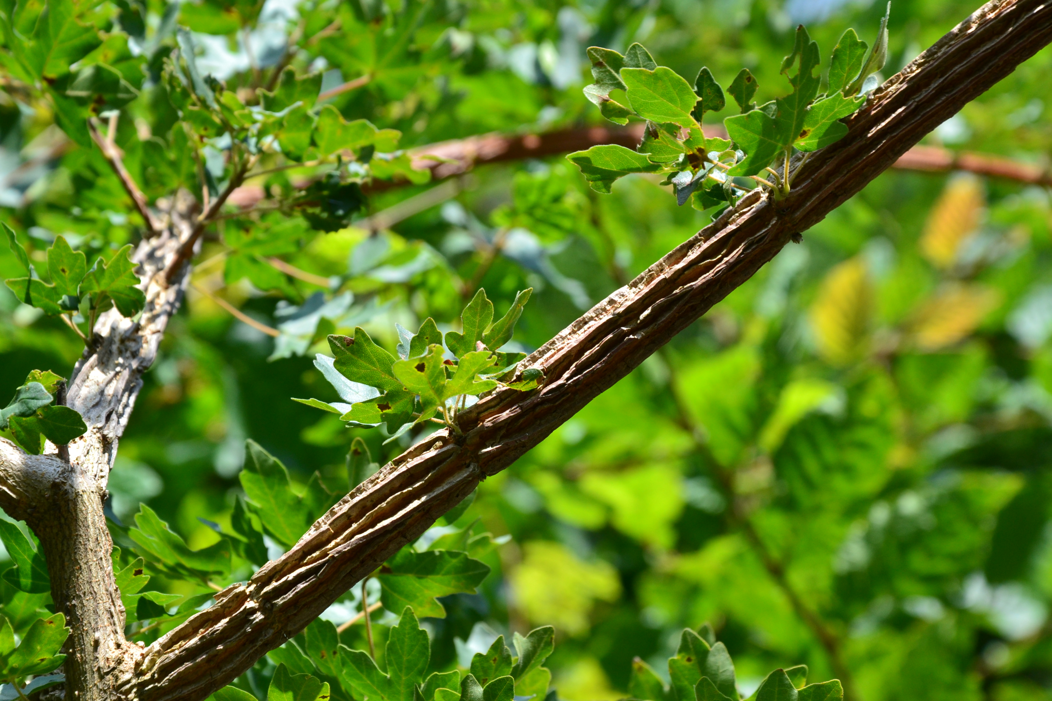 Gałązka klonu polnego z widocznymi listwami korkowymi